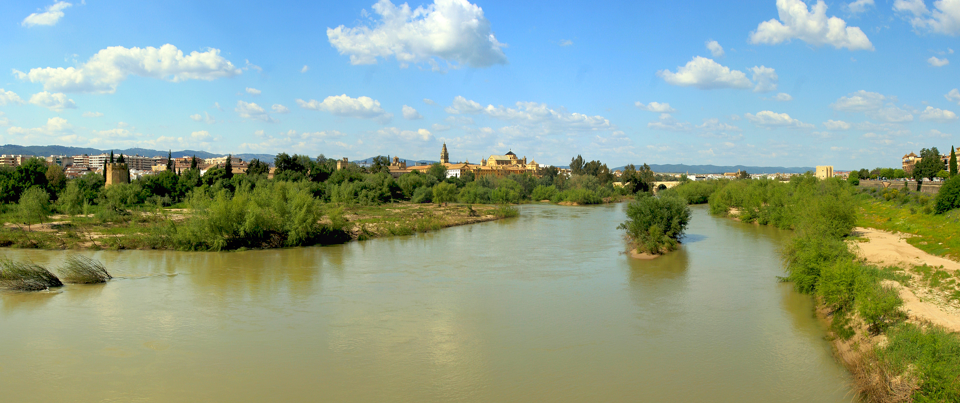 Córdoba (España).